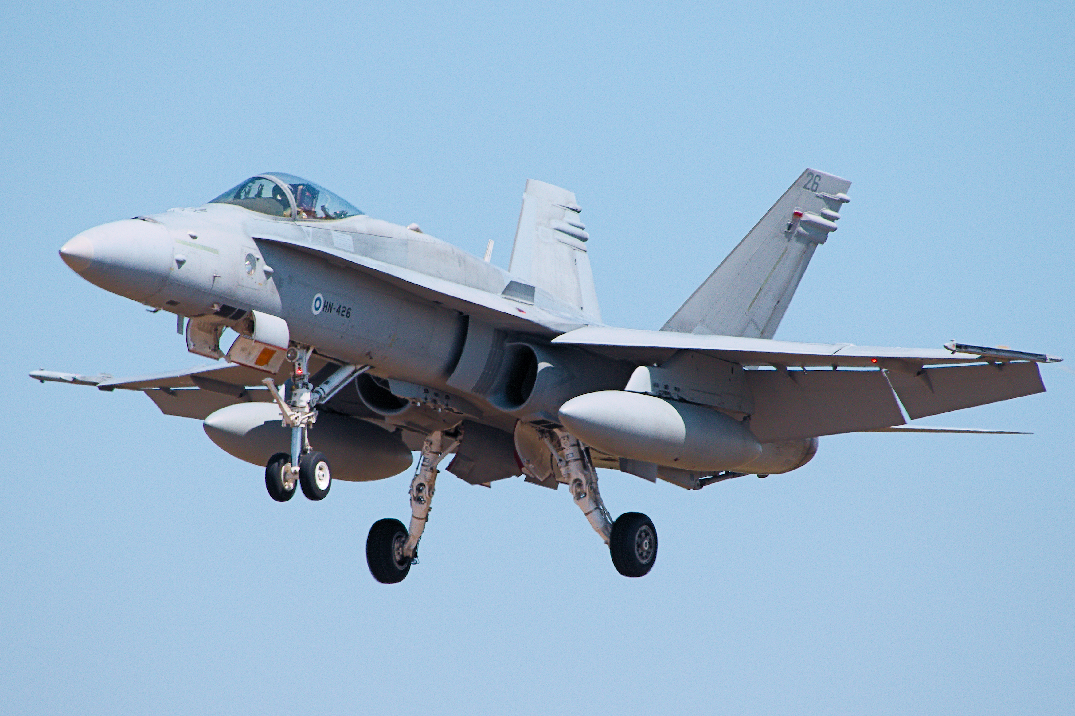 F18 Hornet - RIAT 2018